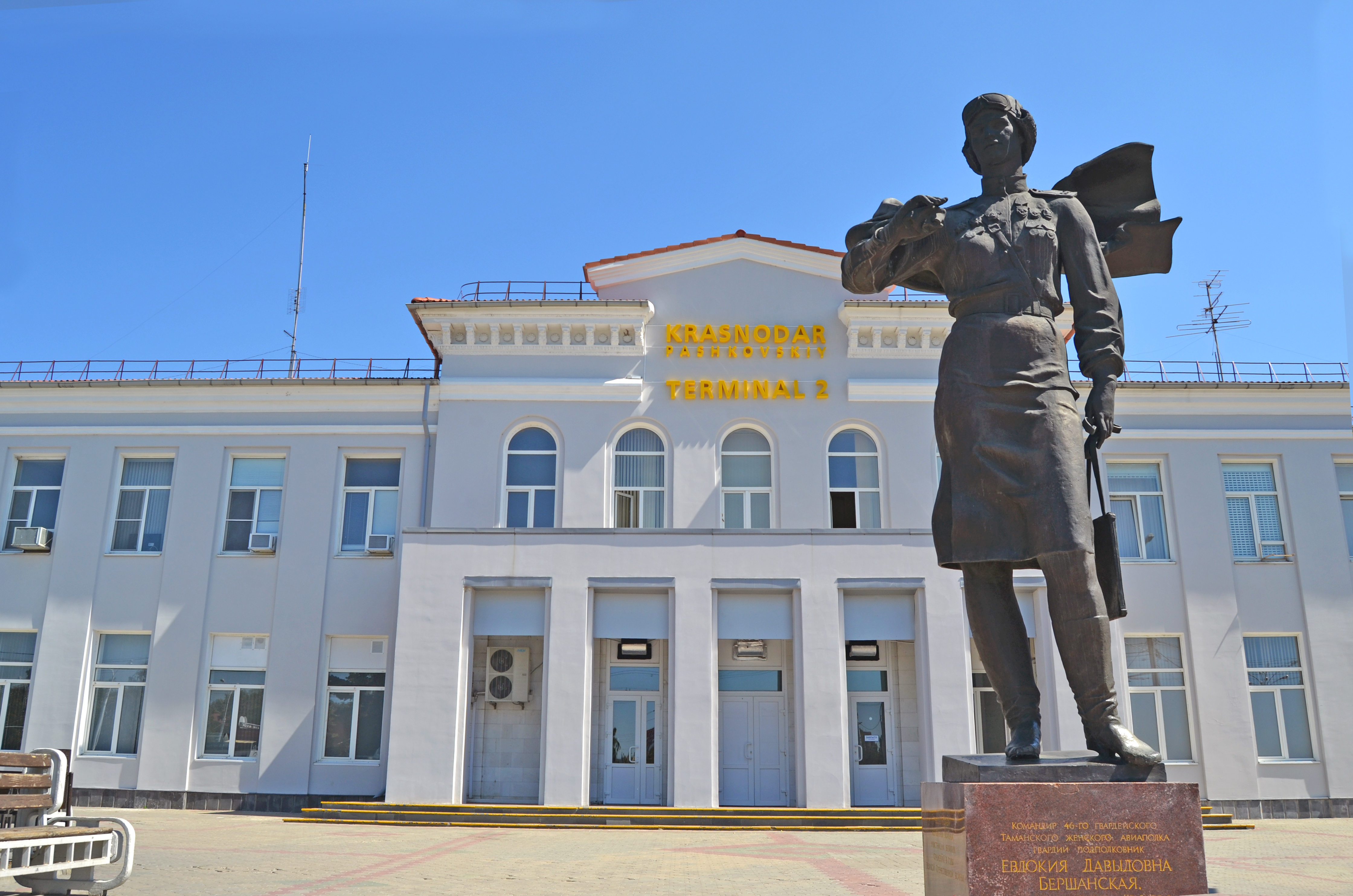 Терминал 2